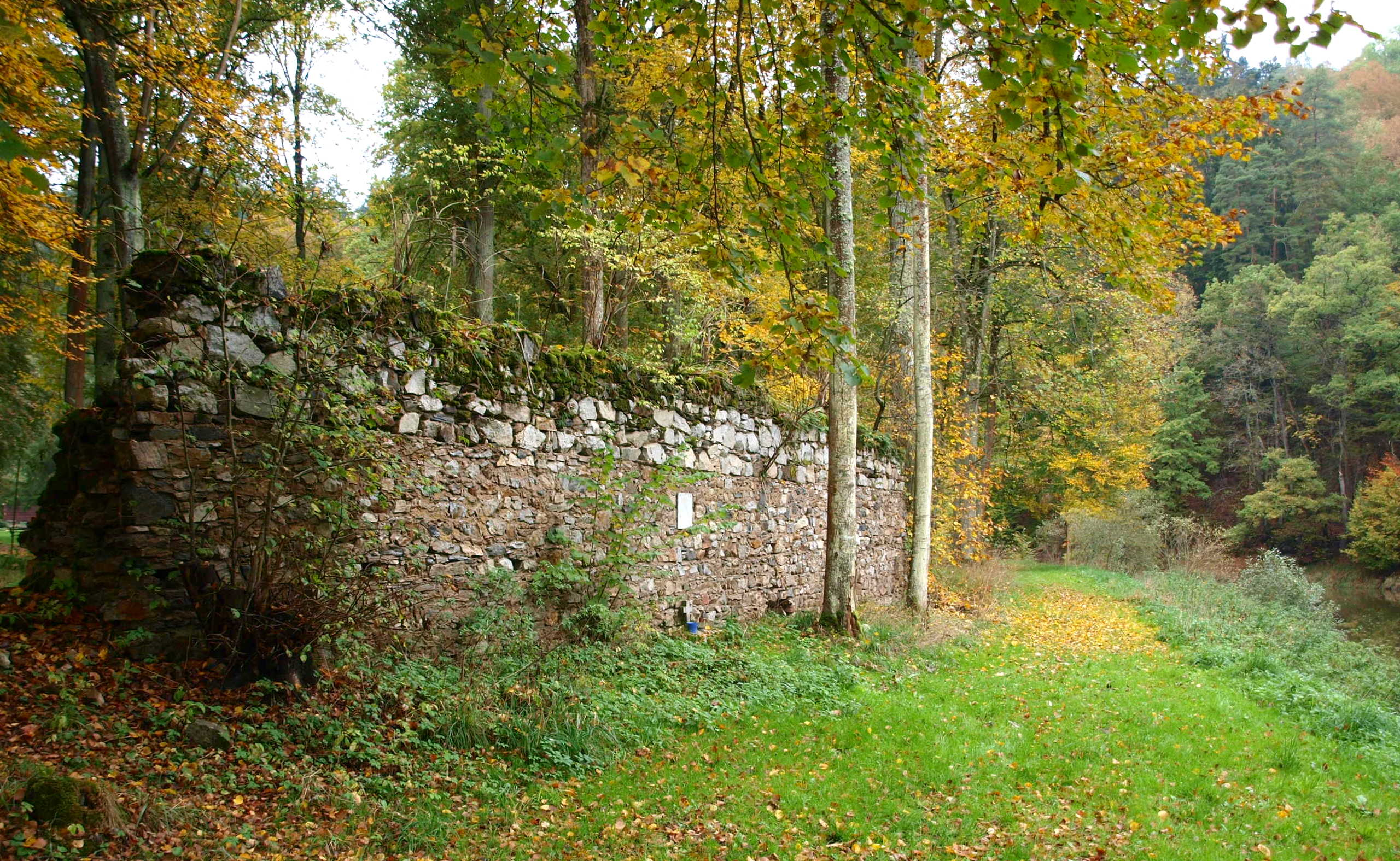 Příběnice, zbytky dolního opevnění